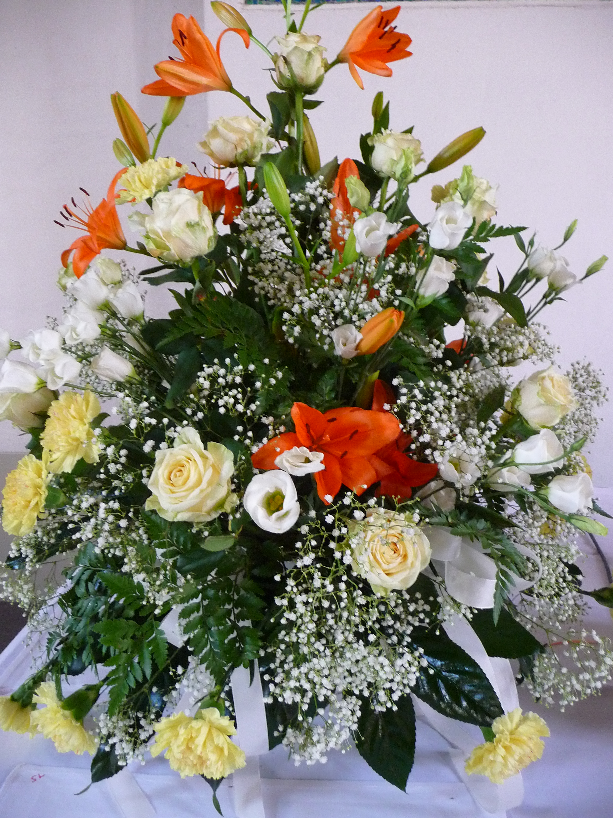 Blumenschmuck, bestehend aus Rosen (Rosa), Lilien (Lilium), Nelken (Dianthus caryophyllus) und ?